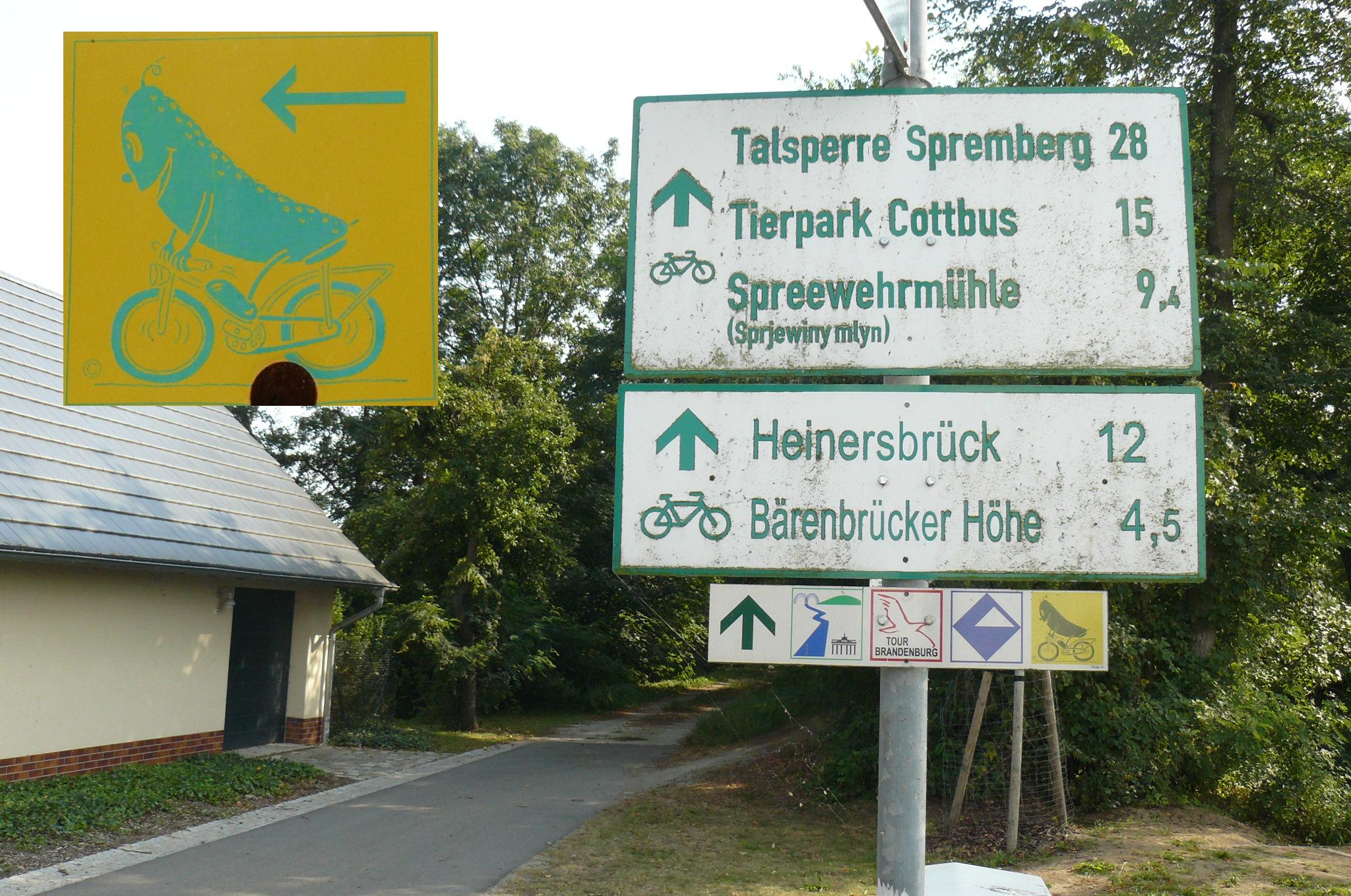 Szlak ogórkowy (Spreewald).